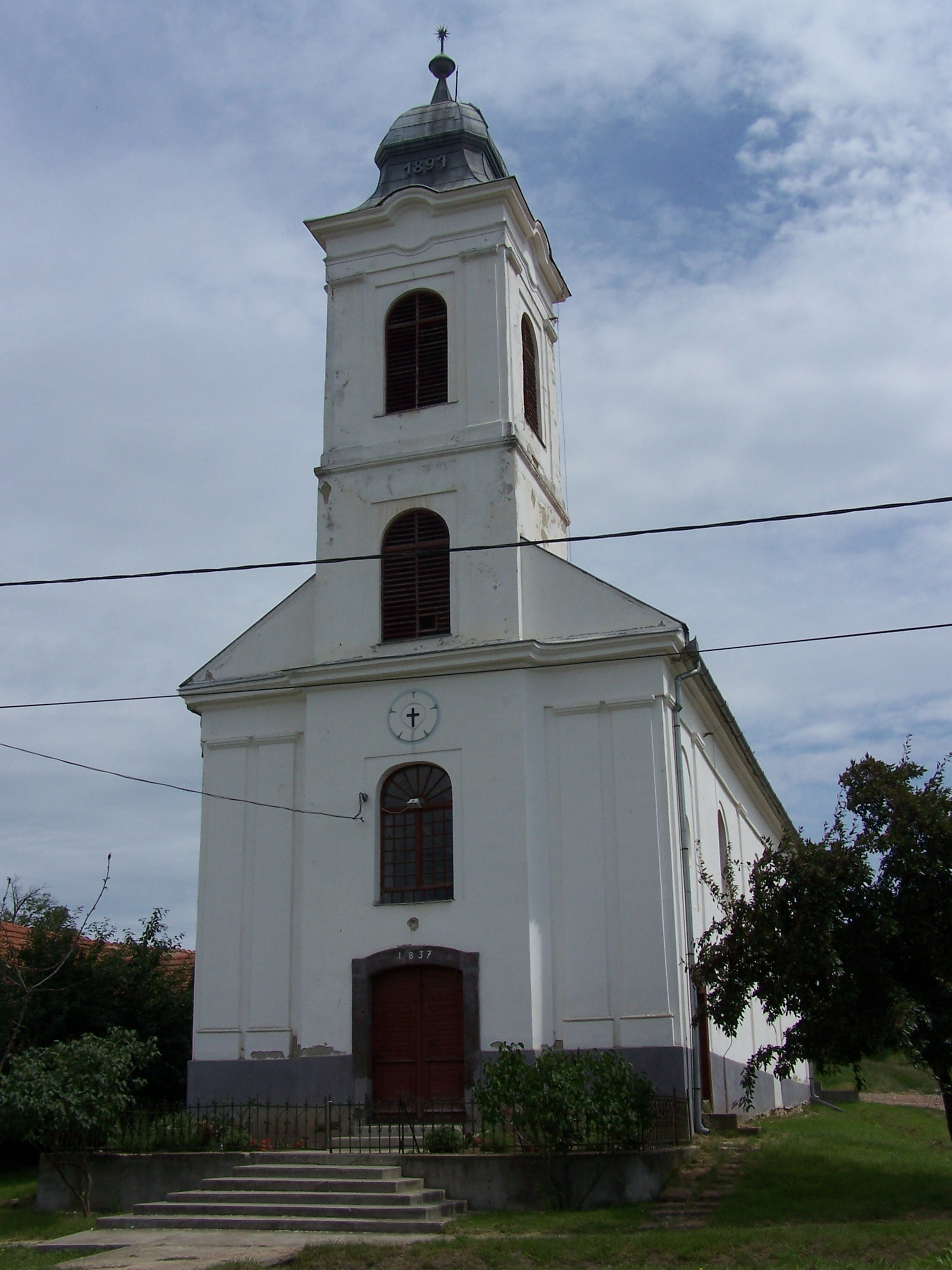 Evangélikus templom (Egyházasdengeleg, Rákóczi Ferenc út 57.) This is a photo of a monument in Hungary, Identifier: 6579